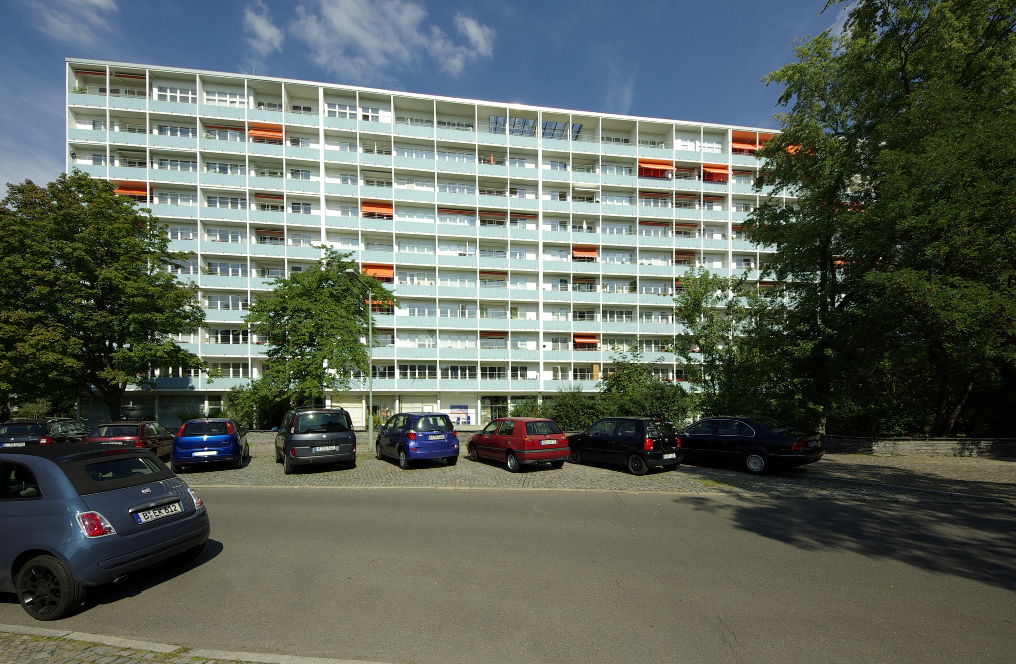 Schwedenhaus, Altonaer Straße 3-9, in Berlin-Hansaviertel